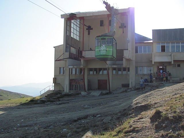 Statia de la Babele telecabinei Busteni-Babele (15 Aug 2010)